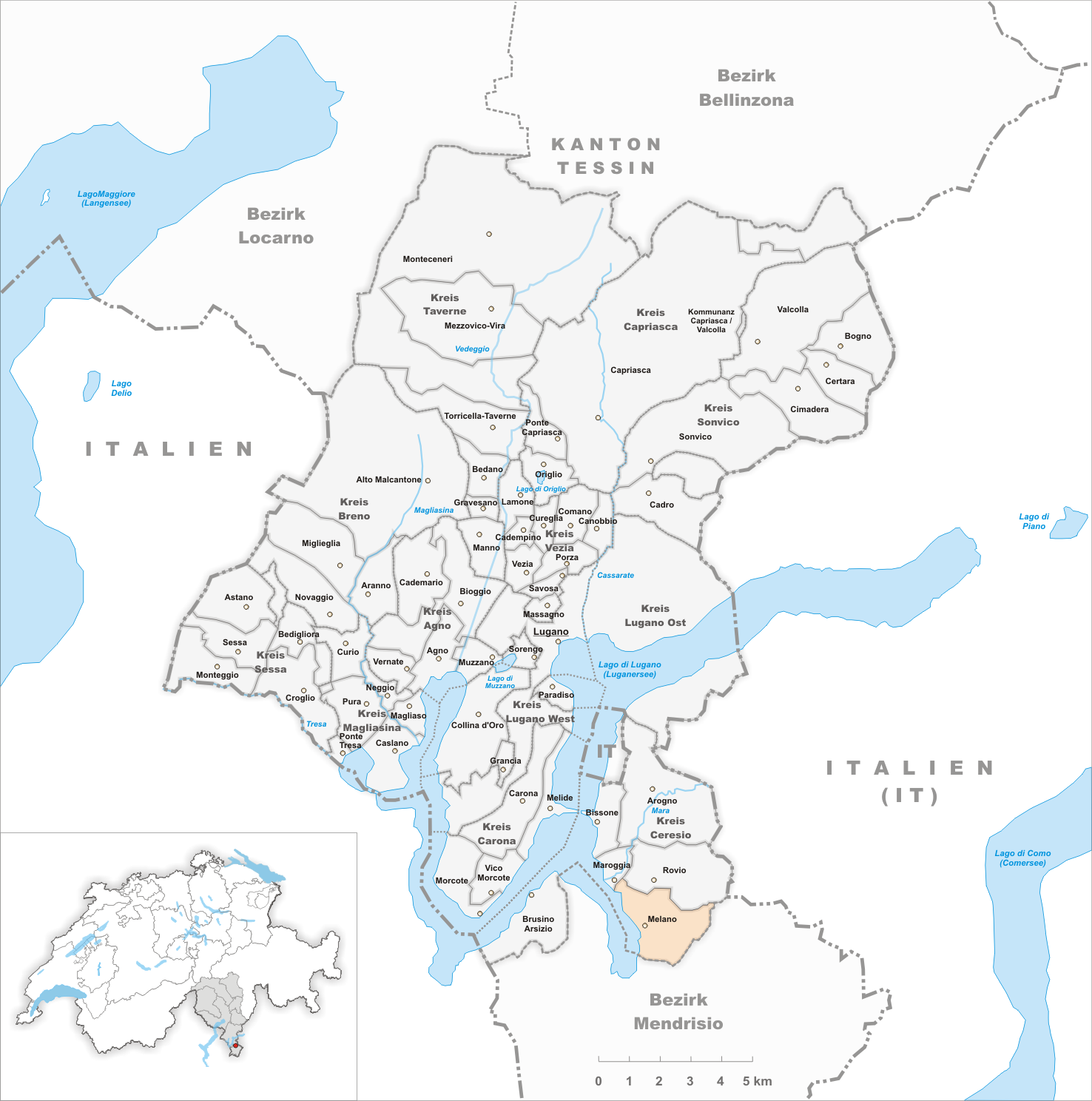 Municipality Melano